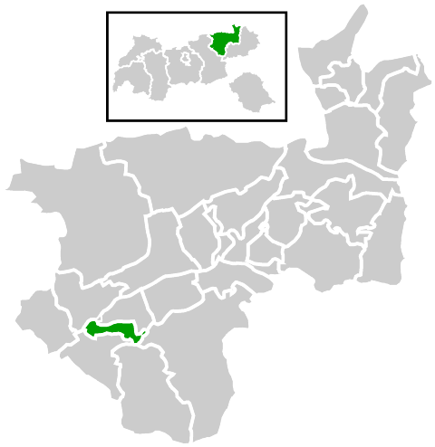 Lage der Gemeinde innerhalb des Bezirks Kufstein